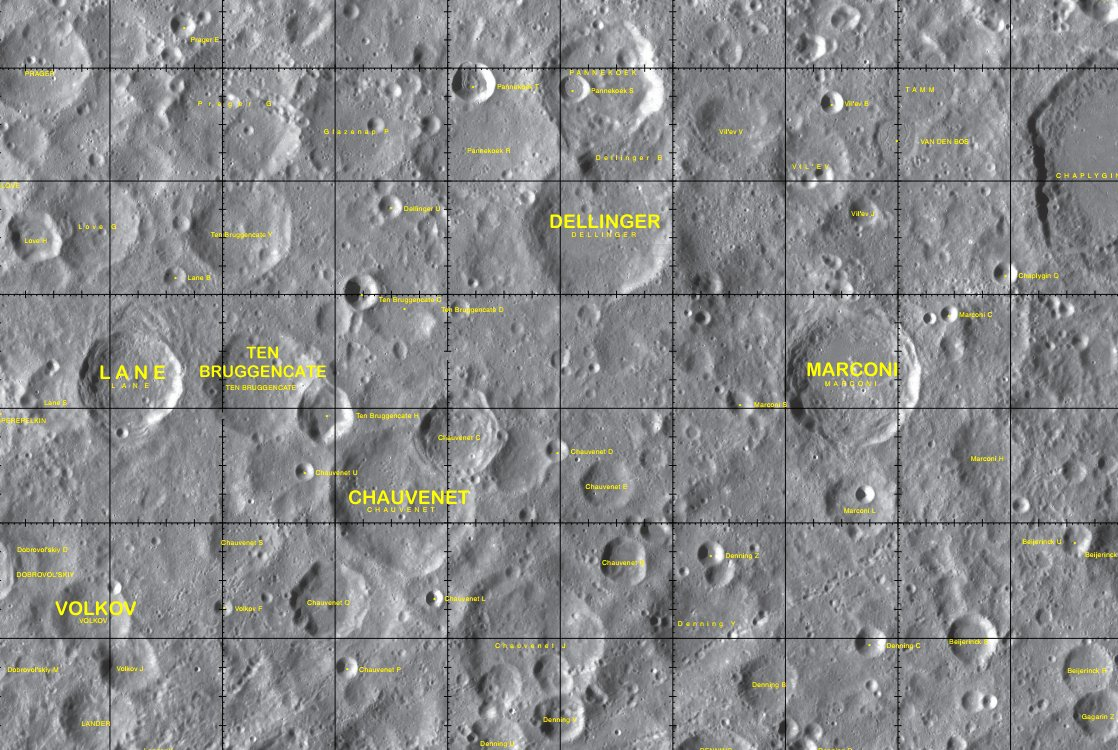 Cráter Chauvenet (LRO)